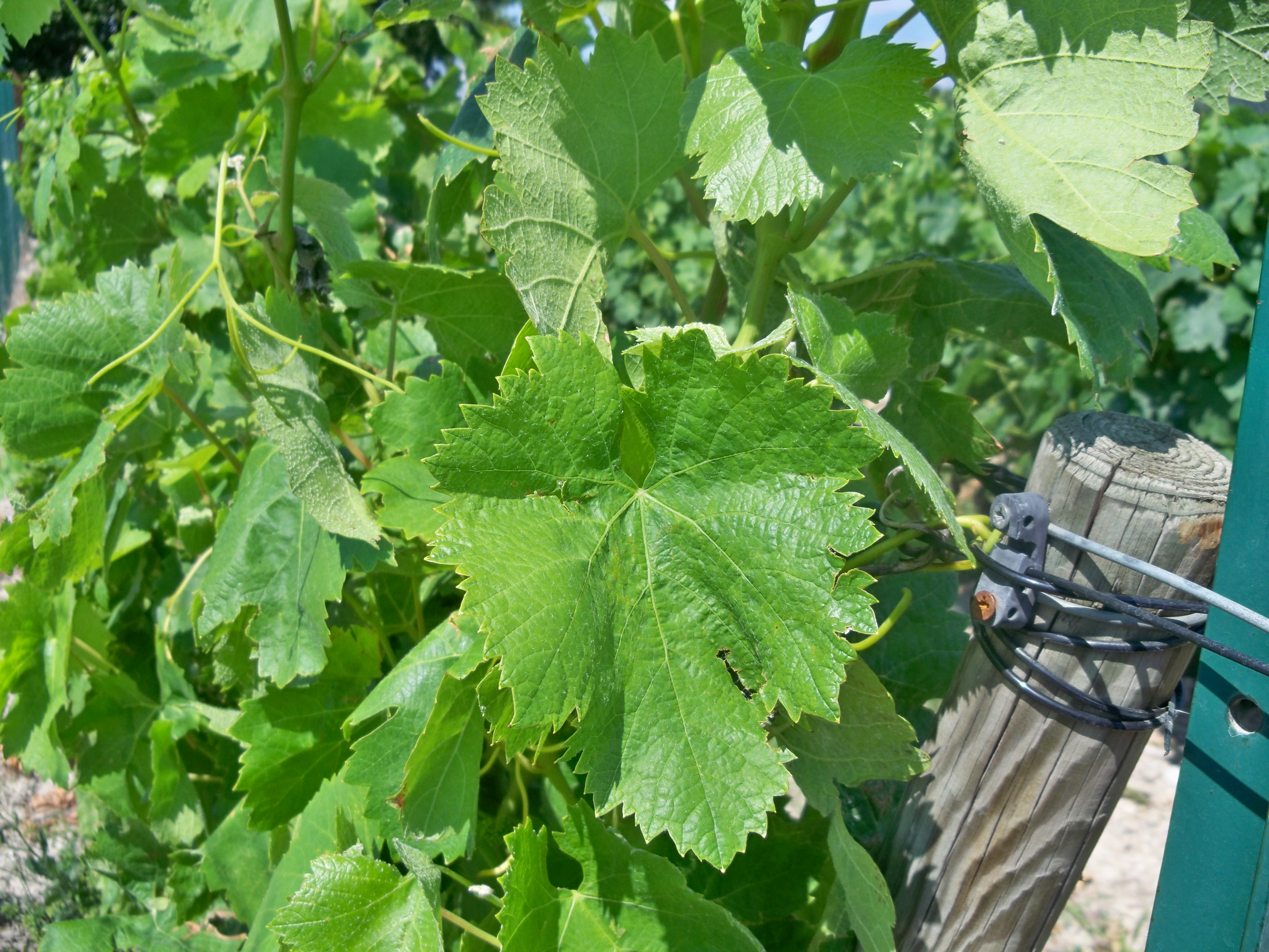 Feuilles de Vignes - Carignan